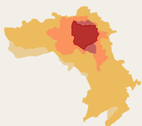 Parte 4